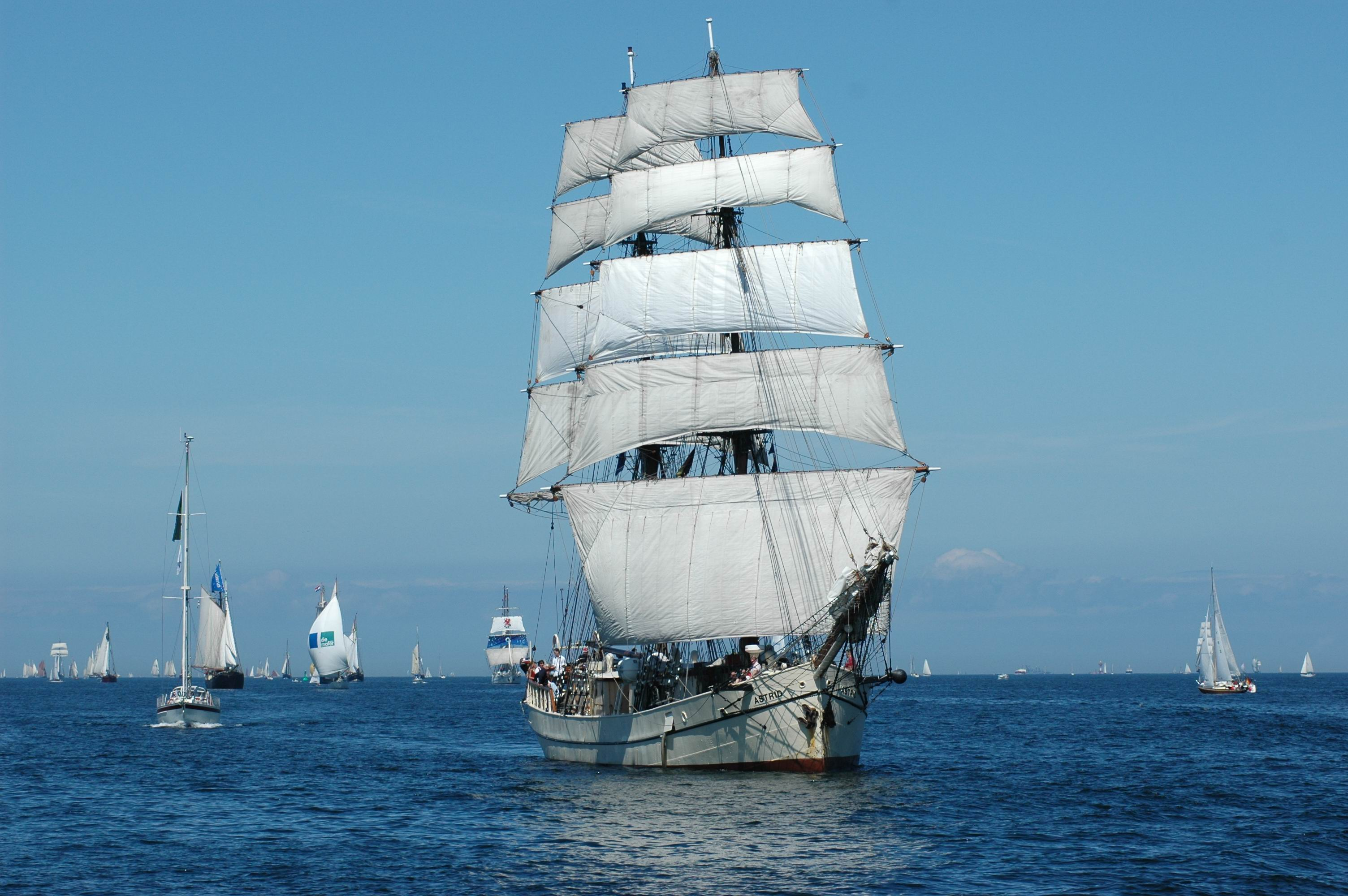 Astrid unter Segeln (fern) IMO Number: 5027792 MMSI Number: 244361000 Callsign: PCDS Length: 42 m Beam: 7 m